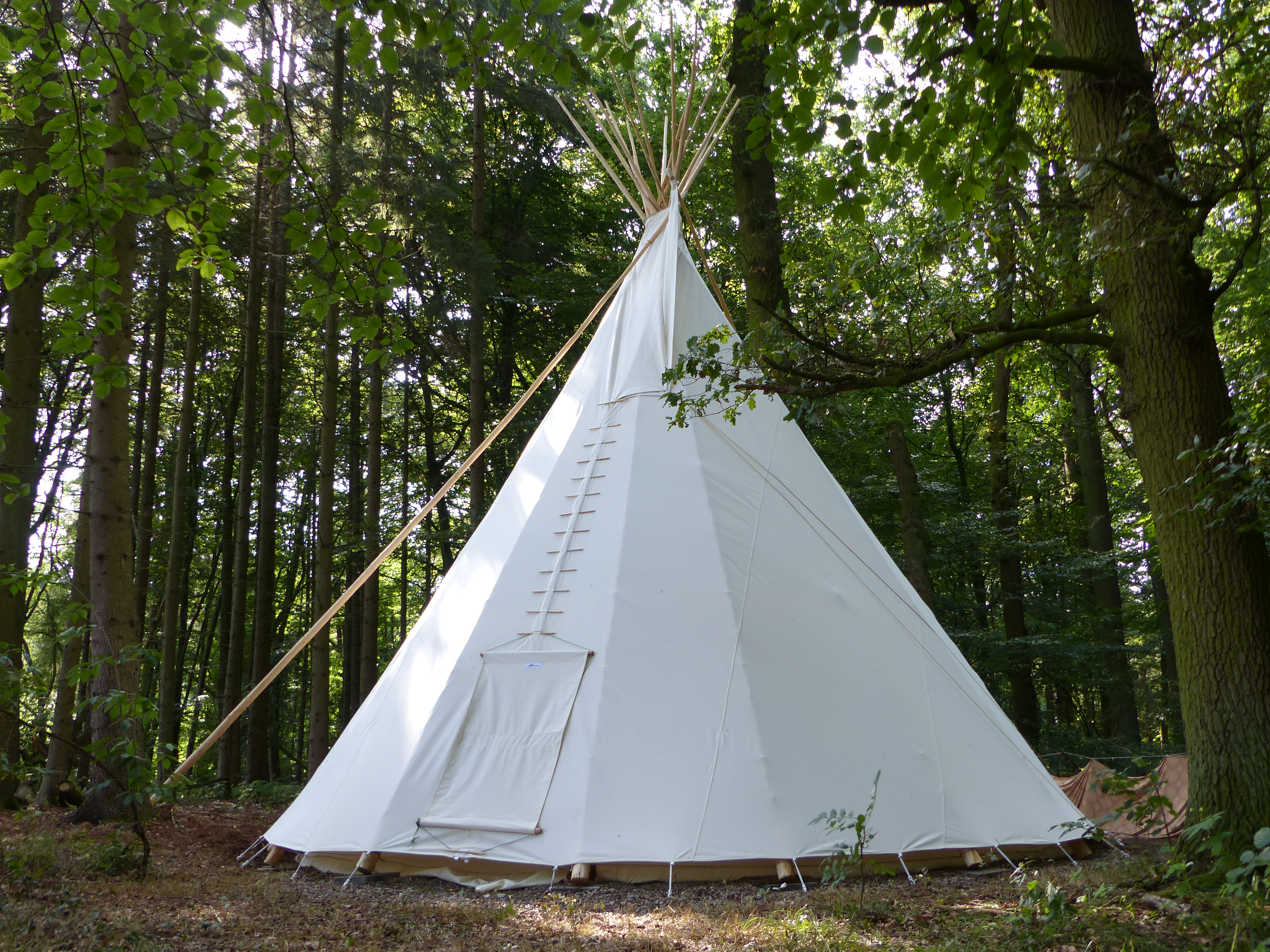 Waldkindergarten Stemweder Berg: Tipi